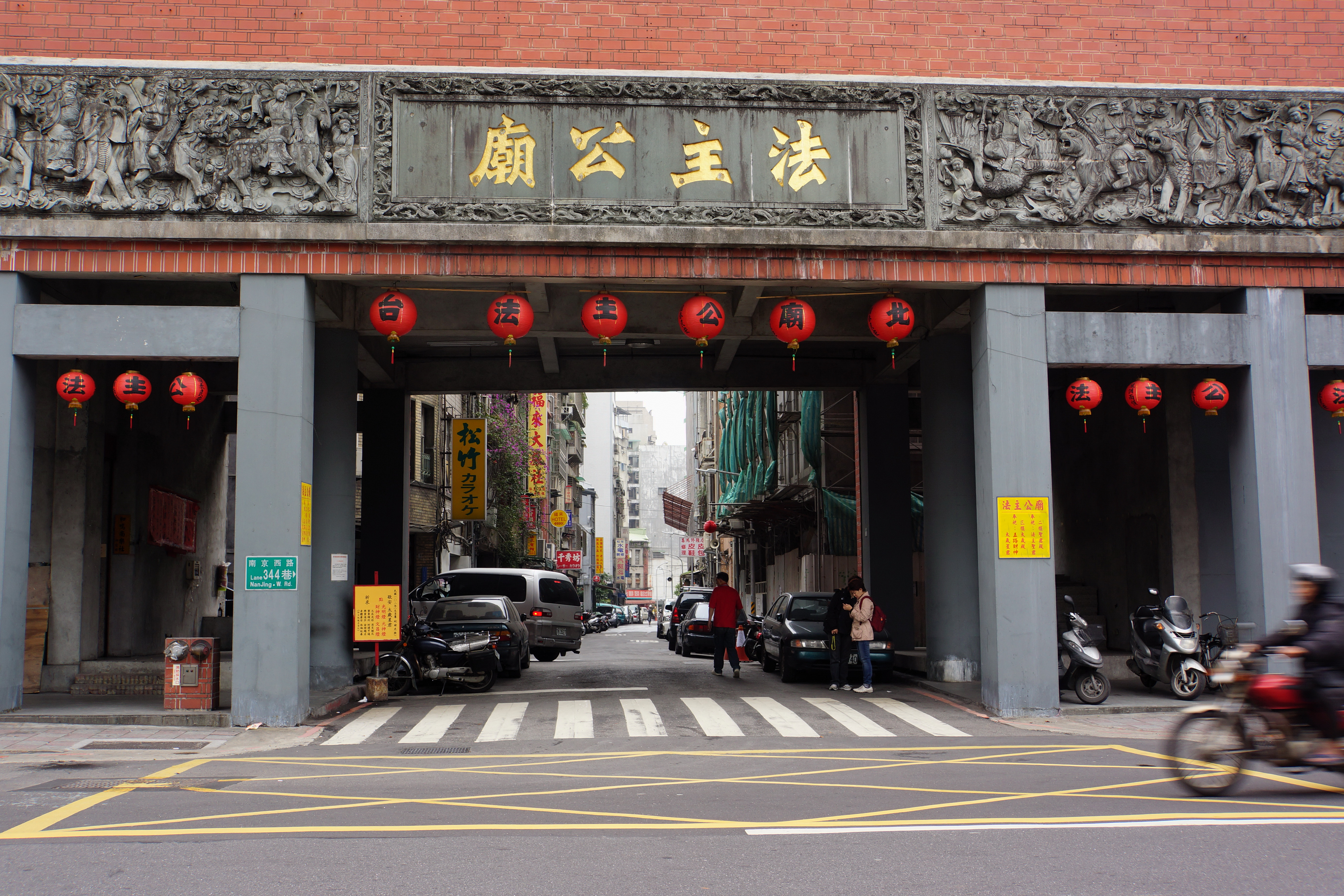 法主公廟，位於臺北市大同區南京西路344巷2號。